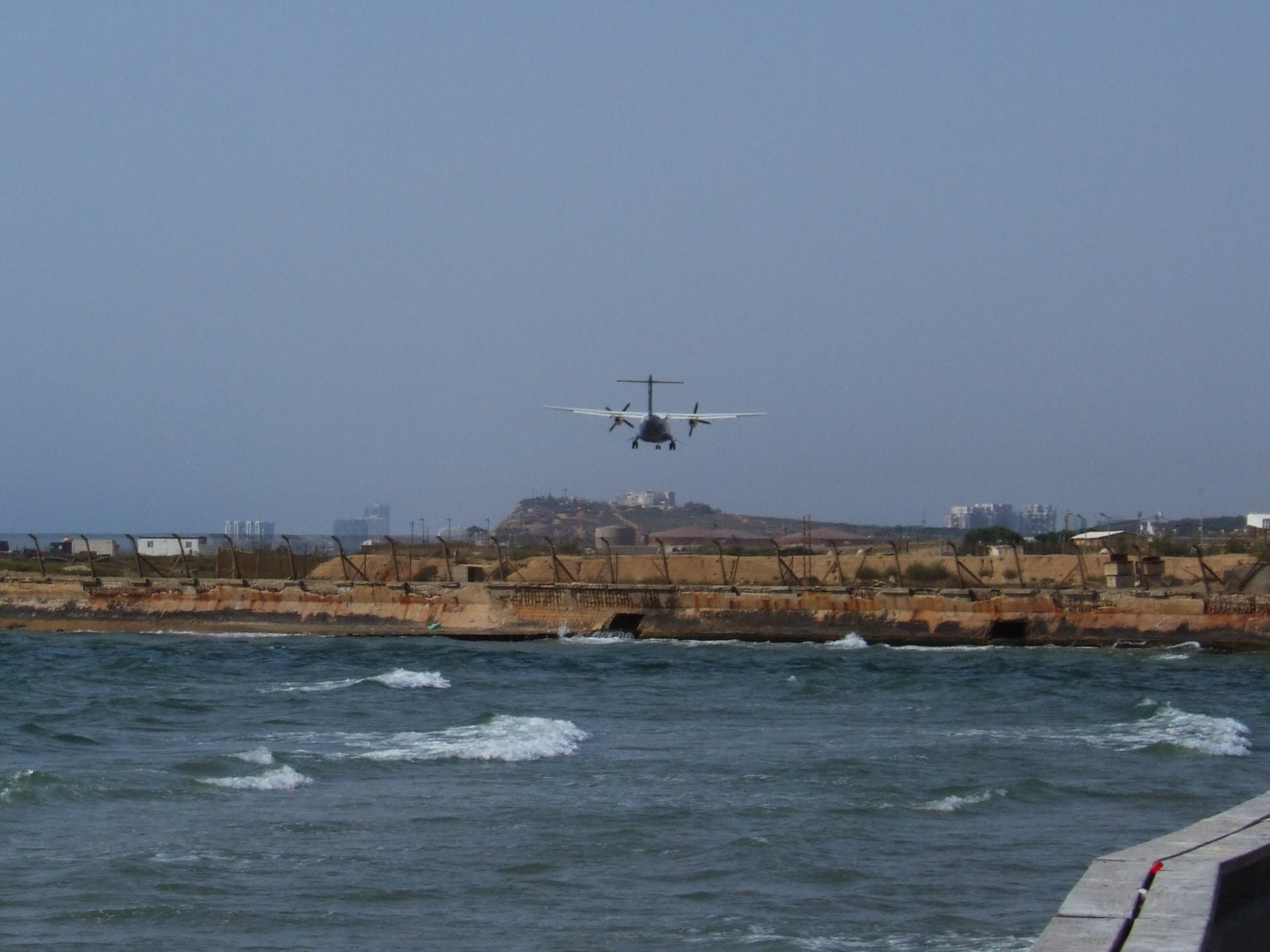 sede dov airport in israel, tel aviv.